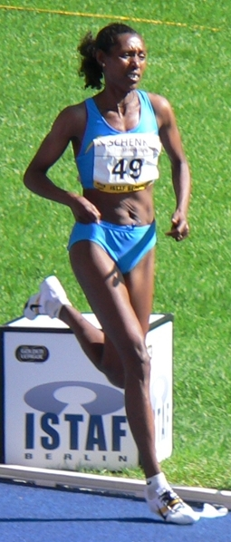 Berhane Adere, Gewinnern 5000m Frauen ISTAF 2005 in Berlin